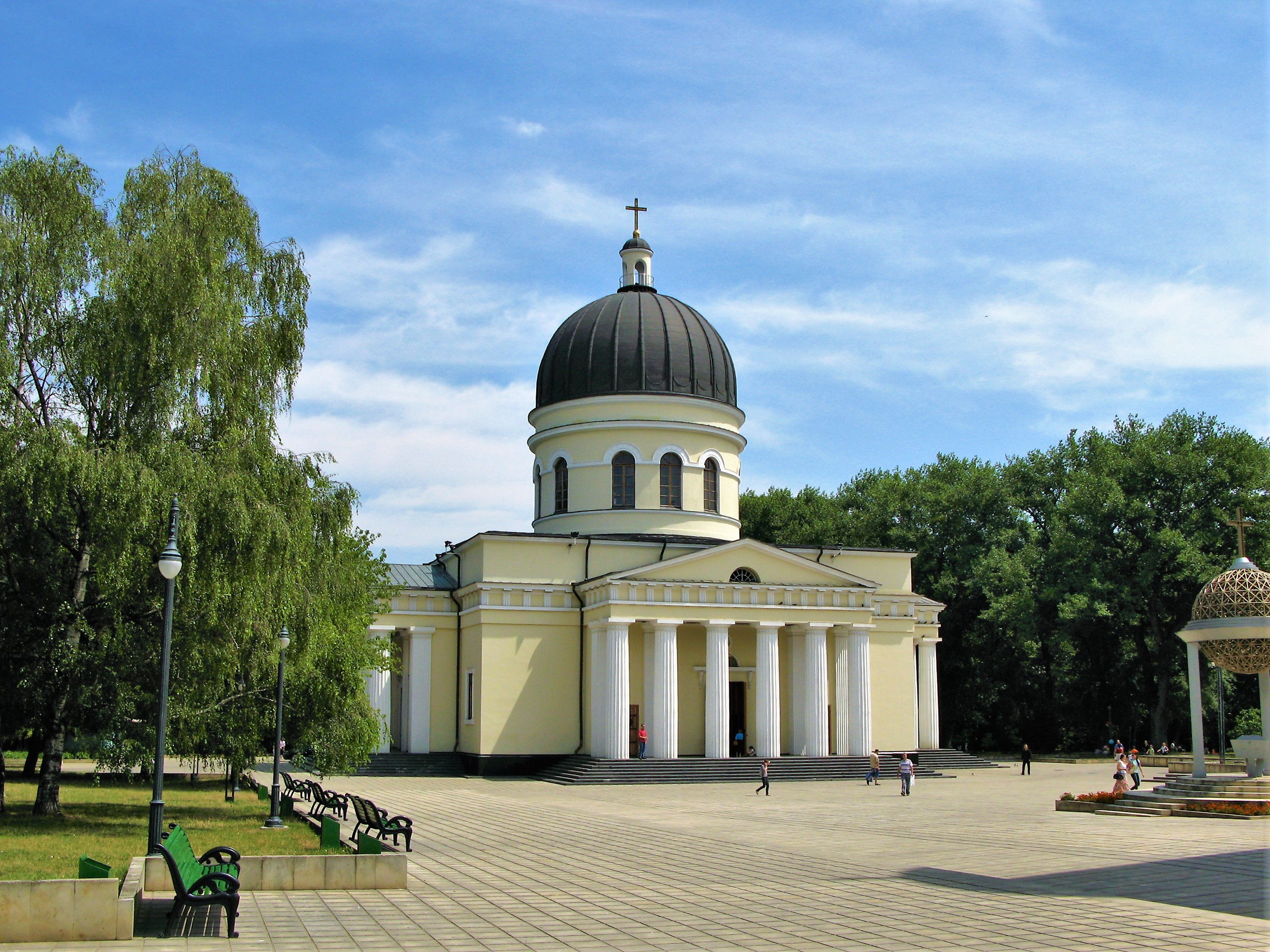 Православна црква у Кишињеву.